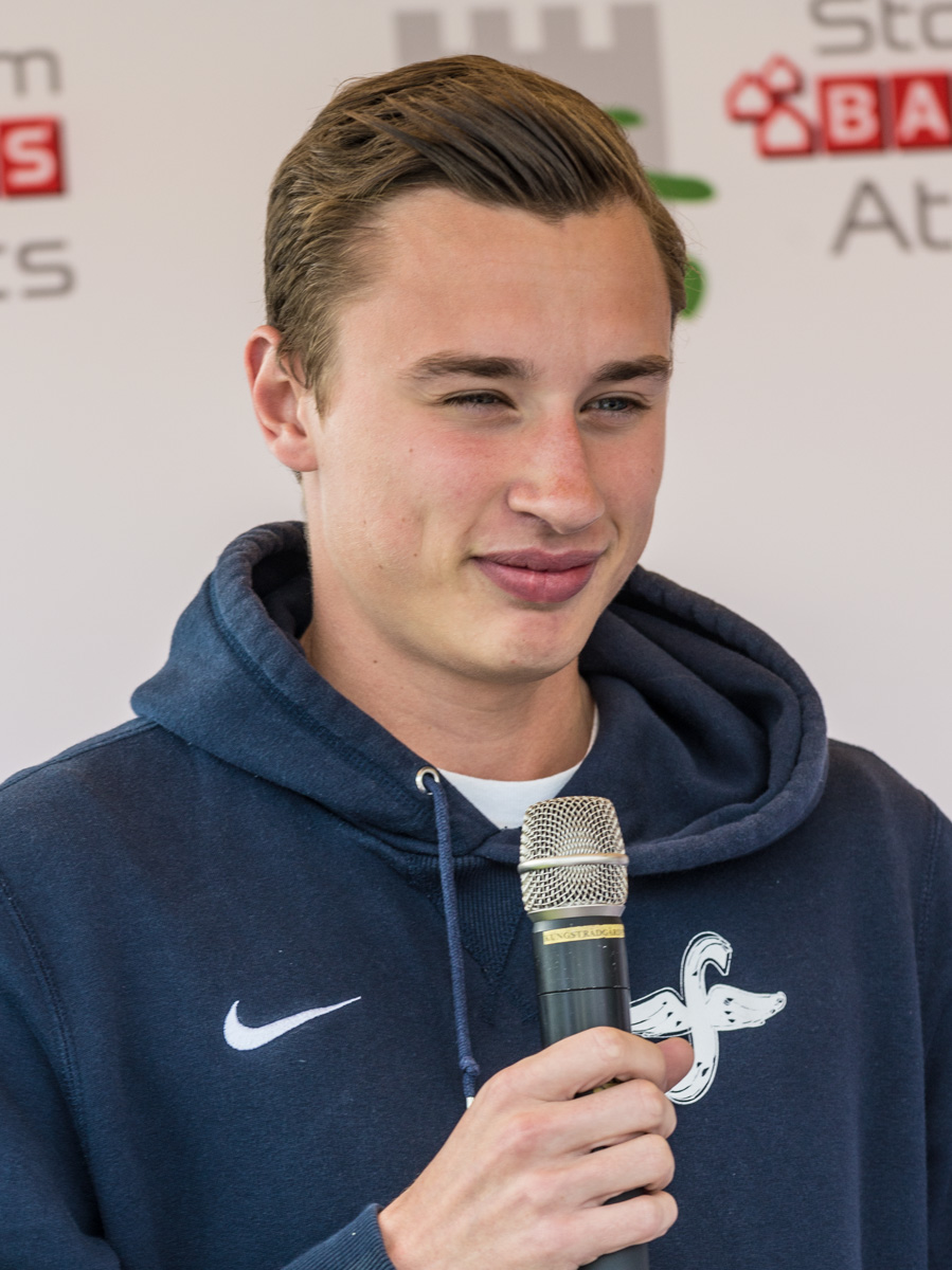 Kalle Berglund på Bauhaus Athletics Kids dag i Kungsträdgården och inför IAAF Diamond League-/Bauhaus-Galan på Stadion i Stockholm i juli 2015.